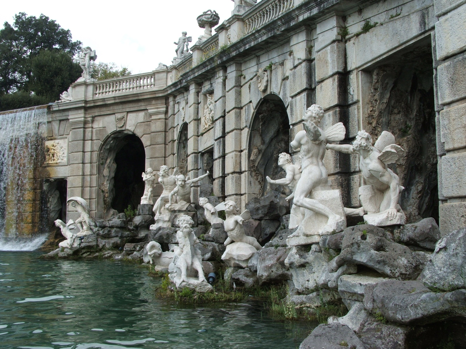 Reggia di Caserta, Caserta, Campania, Italia. Statue e fontane nel parco.